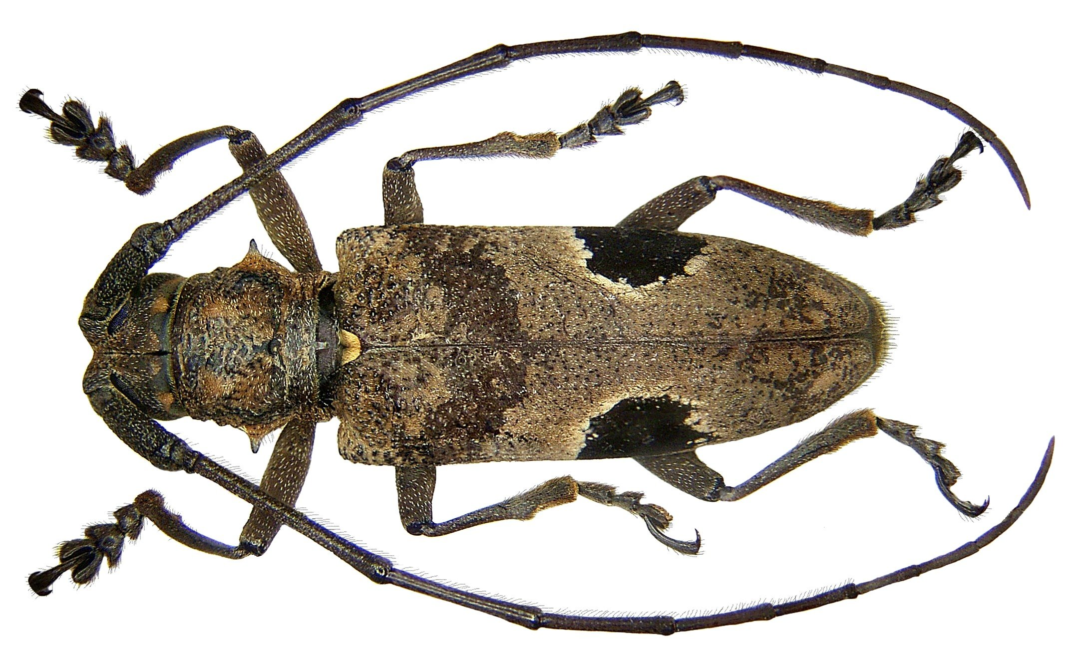 Familie: Cerambycidae Grösse: 26 mm Fundort: Thailand, Prov. Phang Nga, Khao Lak leg. U.Schmidt, 2007; det. A.Weigel, 2007 Foto: U.Schmidt, 2008